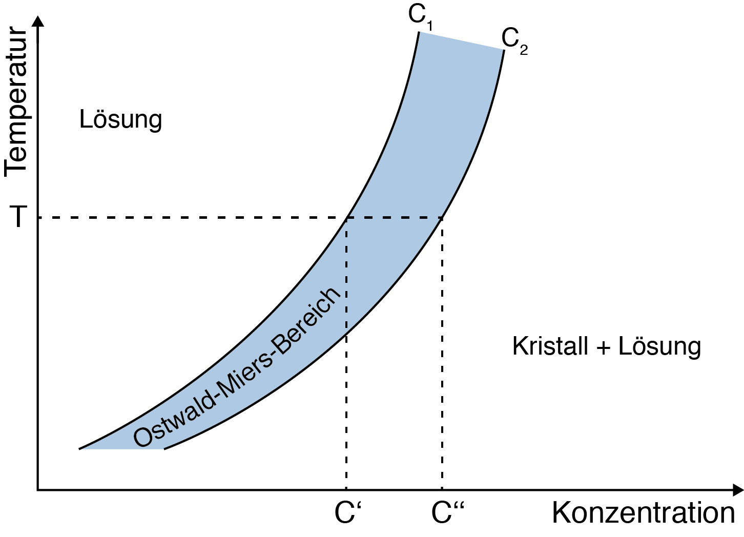 Der Ostwald-Miers-Bereich zwischen der Löslichkeitskurve und dem Ende des Ostwald-Miers-Bereich.